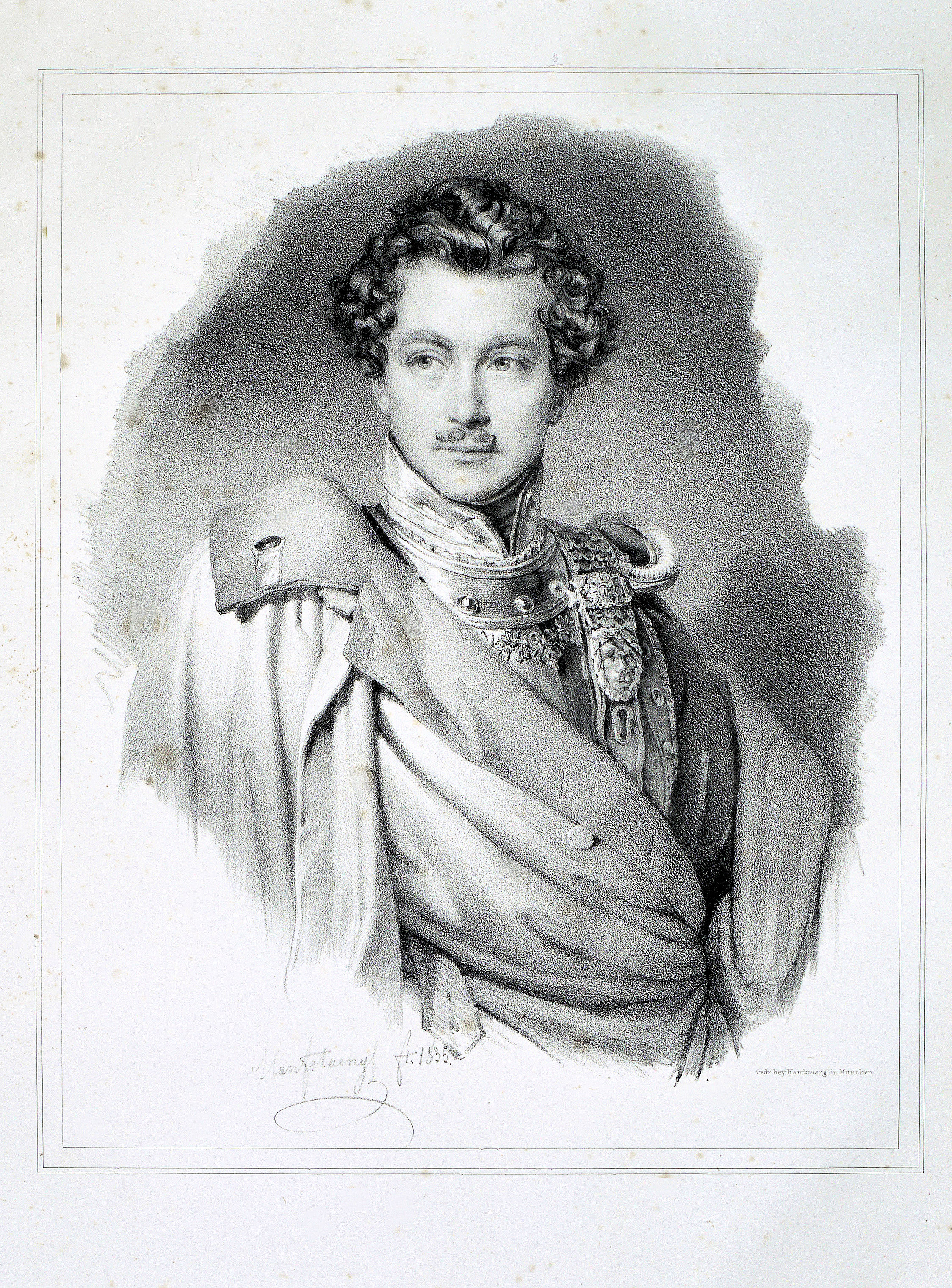 Prinz Karl Theodor von Bayern (1795-1875), Jüngerer Bruder König Ludwig I. von Bayern. Feldmarschall. Lithographie von Franz Hanfstaengl, 1835